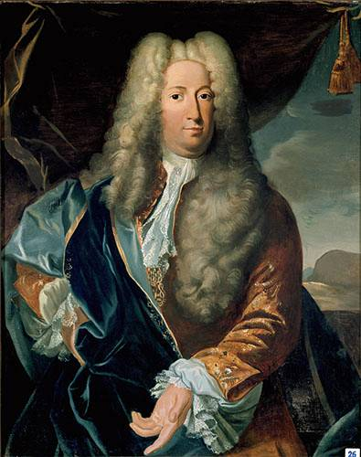 Ritratto di Carlo Vincenzo Ferrero d'Ormea (1680-1745) gran cancelliere del regno di Sardegna